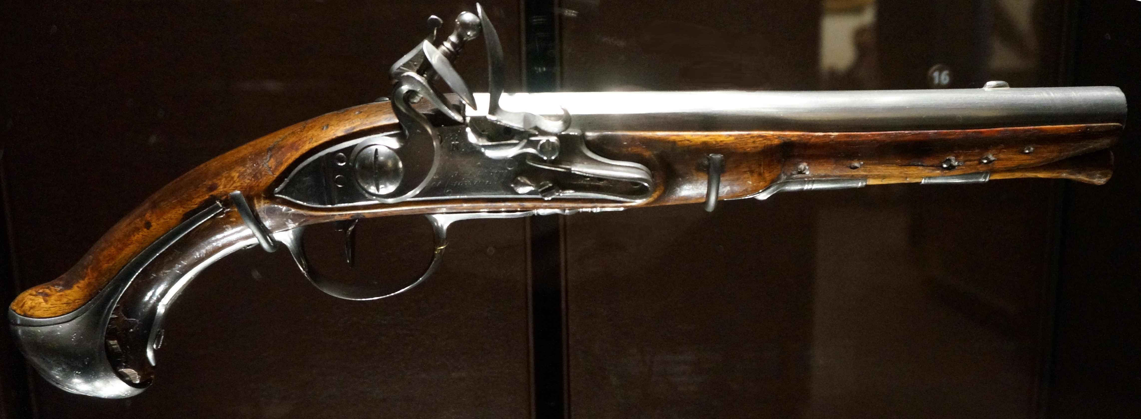 Arme du Régiment_Carabiners_de_Monsieur.